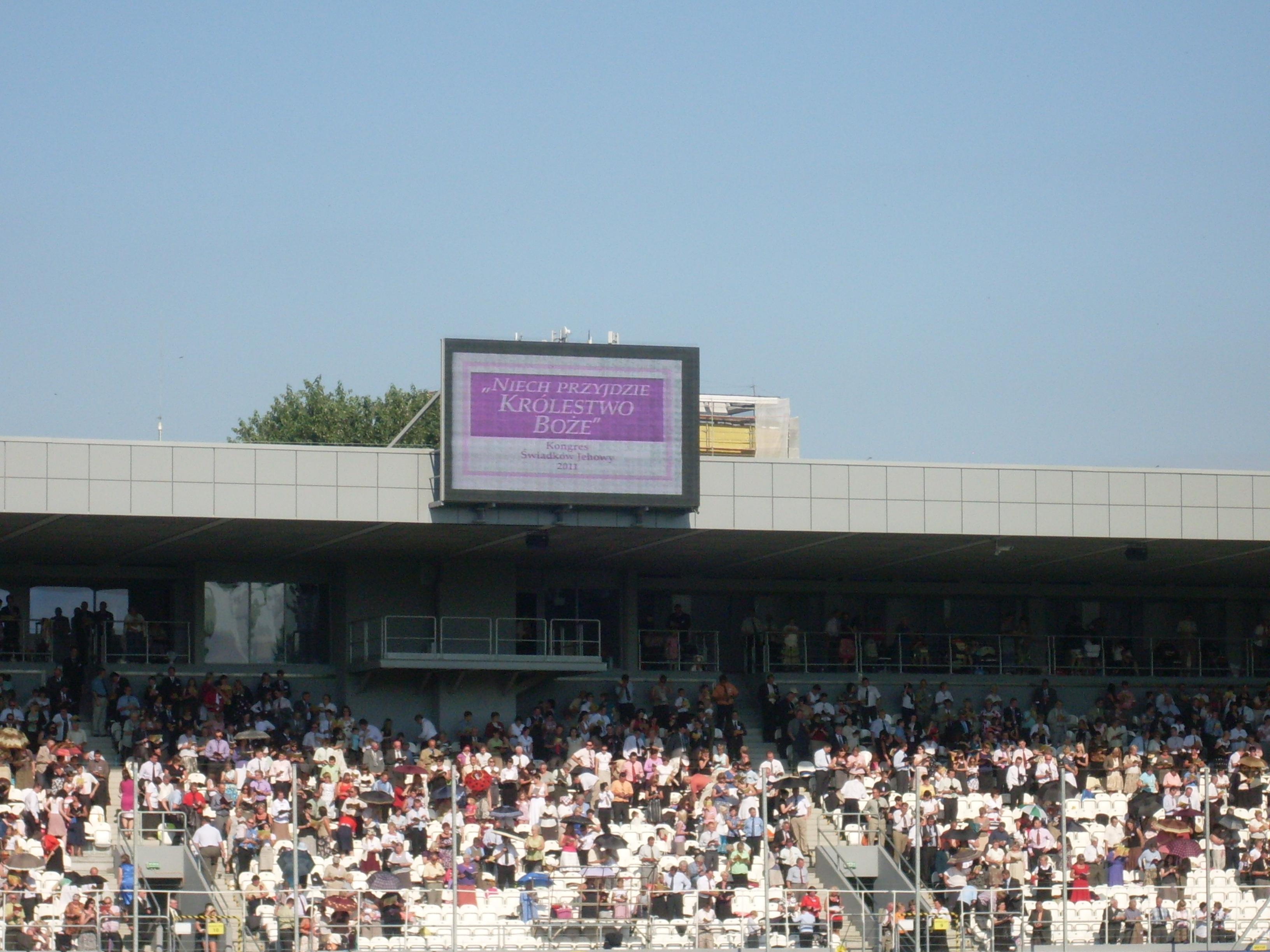 Hasło kongresowe na telebimie przed programen kongresu na stadionie Cracovii w Krakowie, 2011